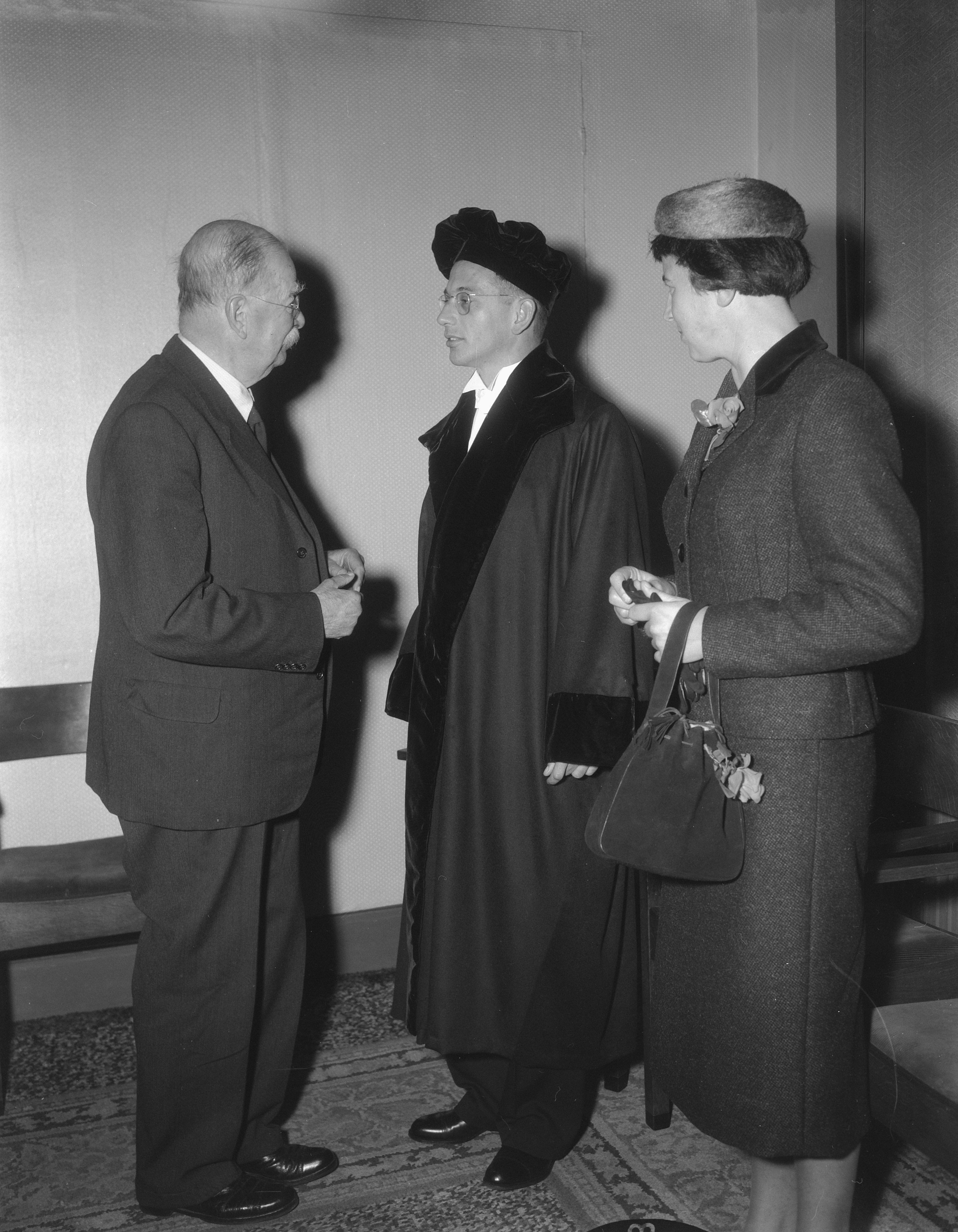 Collectie / Archief : Fotocollectie Anefo Reportage / Serie : [ onbekend ] Beschrijving : Karel van het Reve benoemd tot gewoon hoogleraar Russische taal- en letterkunde aan de Rijksuniversiteit Leiden. Zijn oratie vond plaats op 18 oktober 1957. Rechts op foto de vrouw van de hoogleraar Van het Reve, J(ozien) van het Reve-Israel. Datum : 18 oktober 1957 Locatie : Leiden, Zuid-Holland Trefwoorden : benoemingen, hoogleraren, oraties, universiteiten Persoonsnaam : Reve, Karel van het, Reve-Israel J. van Het Fotograaf : Pot, Harry / Anefo Auteursrechthebbende : Nationaal Archief Materiaalsoort : Negatief (zwart/wit) Nummer archiefinventaris : bekijk toegang 2.24.01.04 Bestanddeelnummer : 909-0405